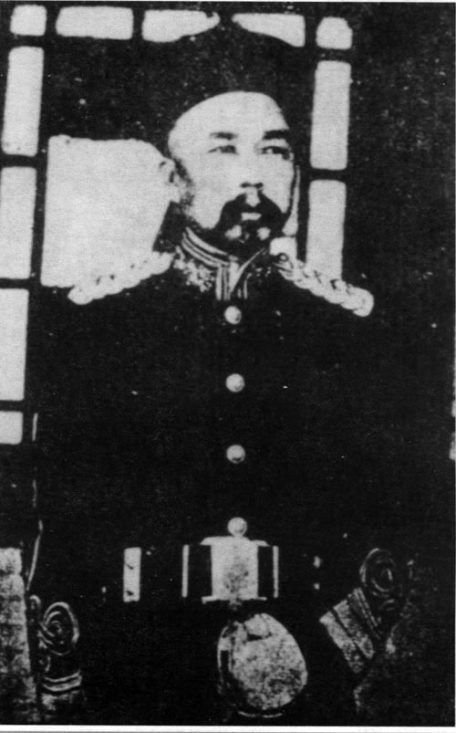 凤山，清朝官员